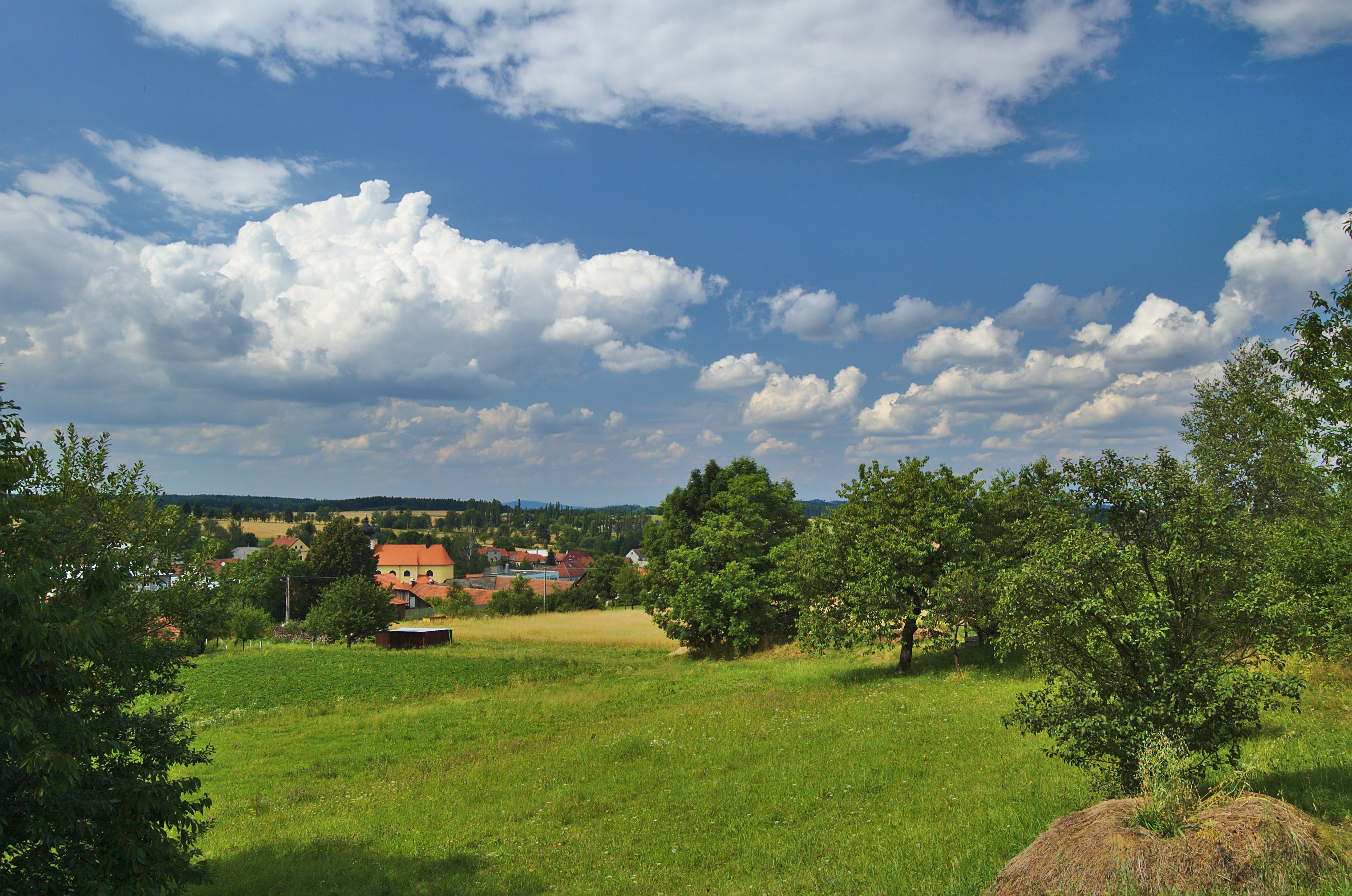 Pohled na obec od jihovýchodu, Horní Štěpánov, okres Prostějov